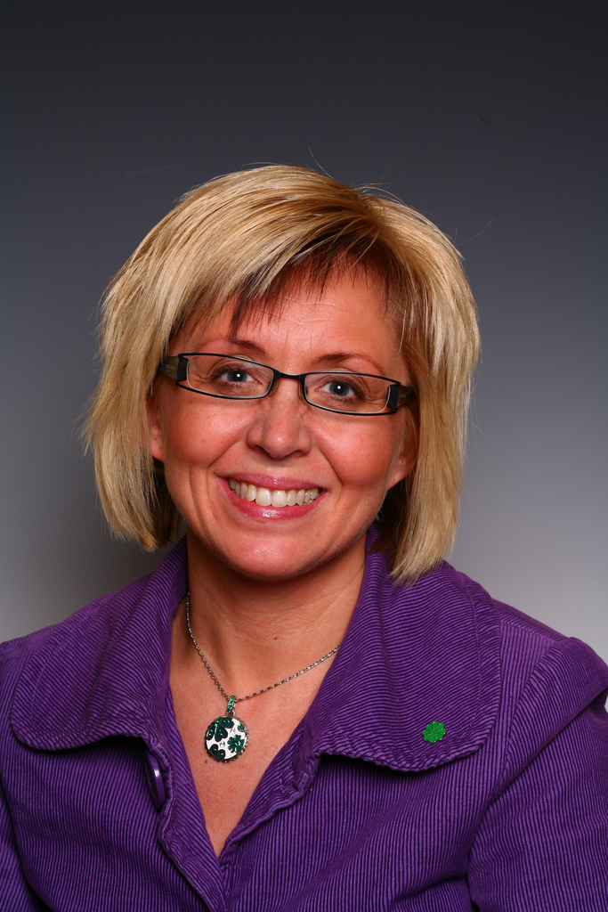 18Troms, Irene Lange Nordahl